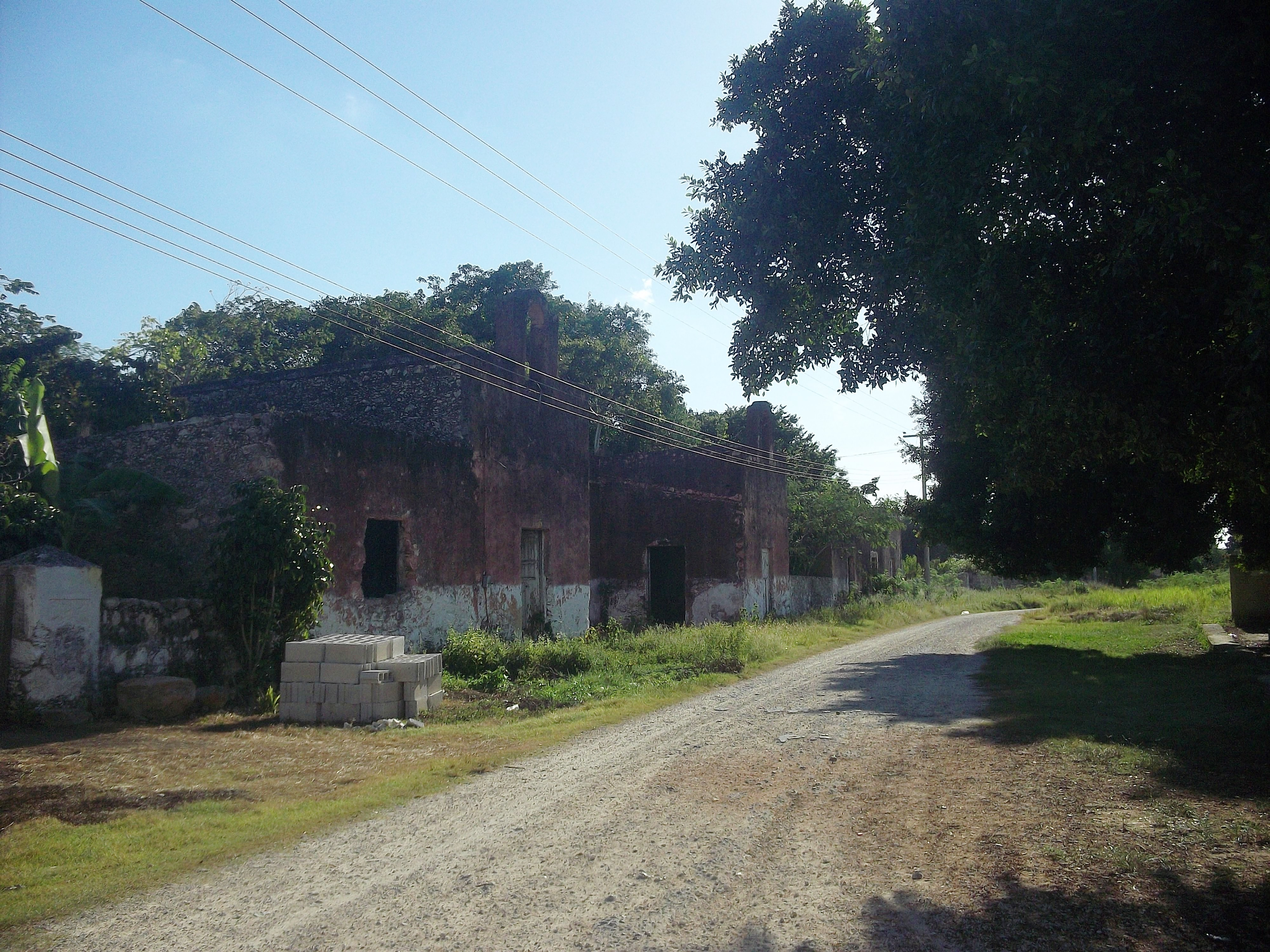 Vista de la hacienda Xtabay, Yucatán.